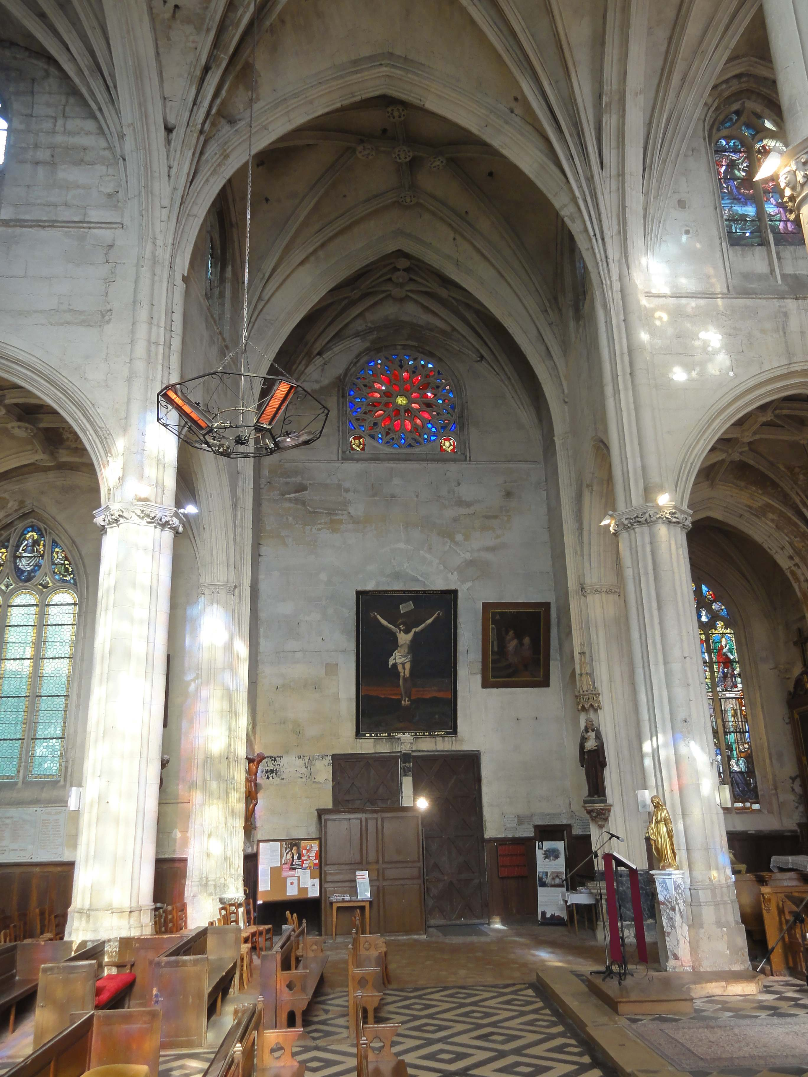 Intérieur de l'église - voir titre.